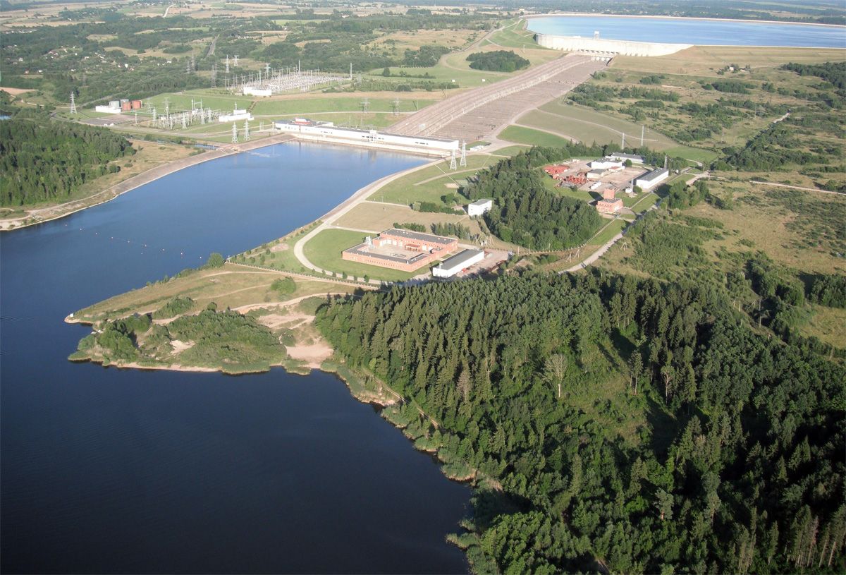 View form Arlaviskes